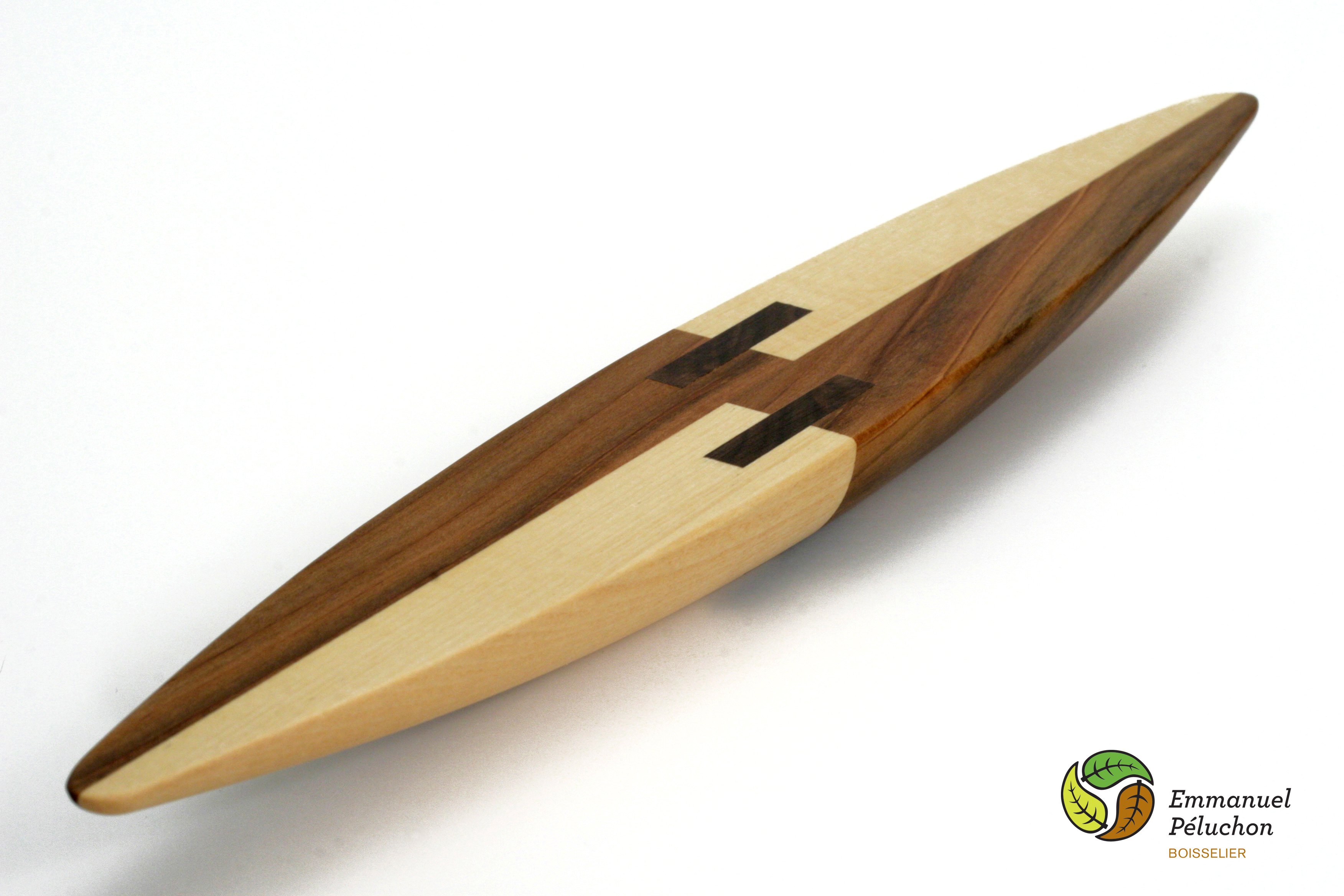 Anagyre de collection avec assemblages d'ébénisterie - Noyer noir, pommier et bouleau